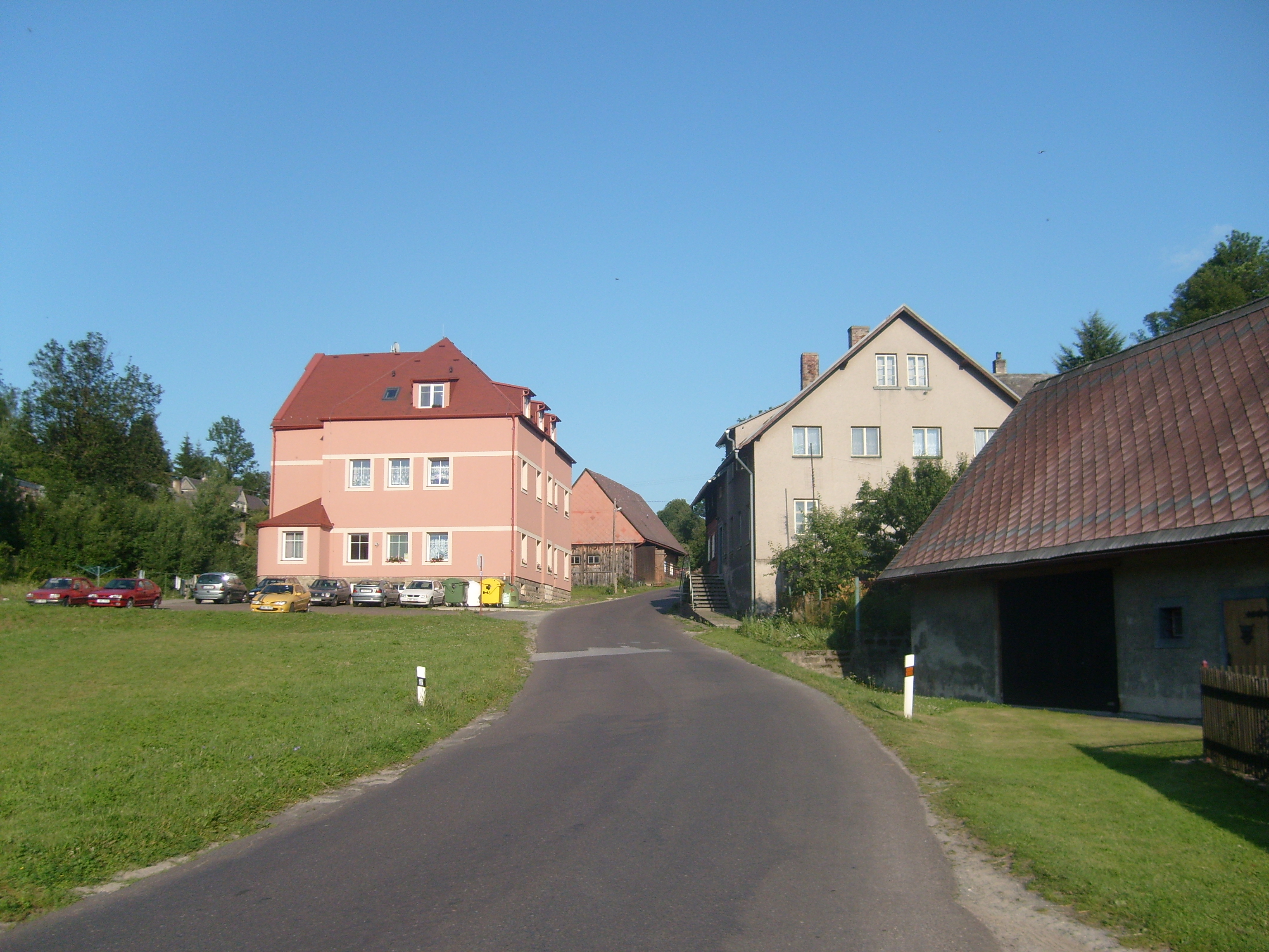 Lachov (Teplice nad Metuji)